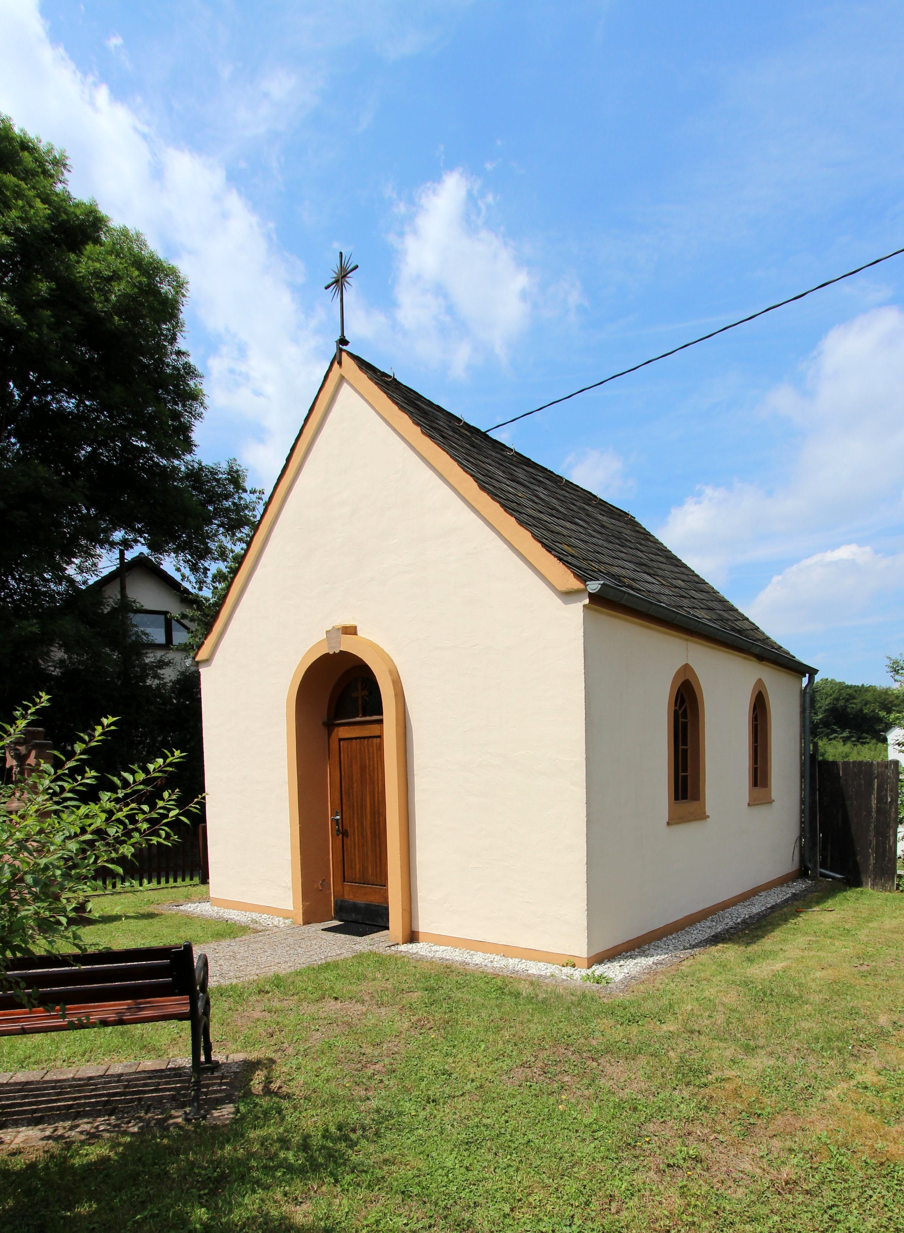 54597 Feuerscheid, bei Hardt Nr. 4. Neu errichtete Kapelle von 1957 (Vorgängerbau von 1867). Aufnahme von 2017.